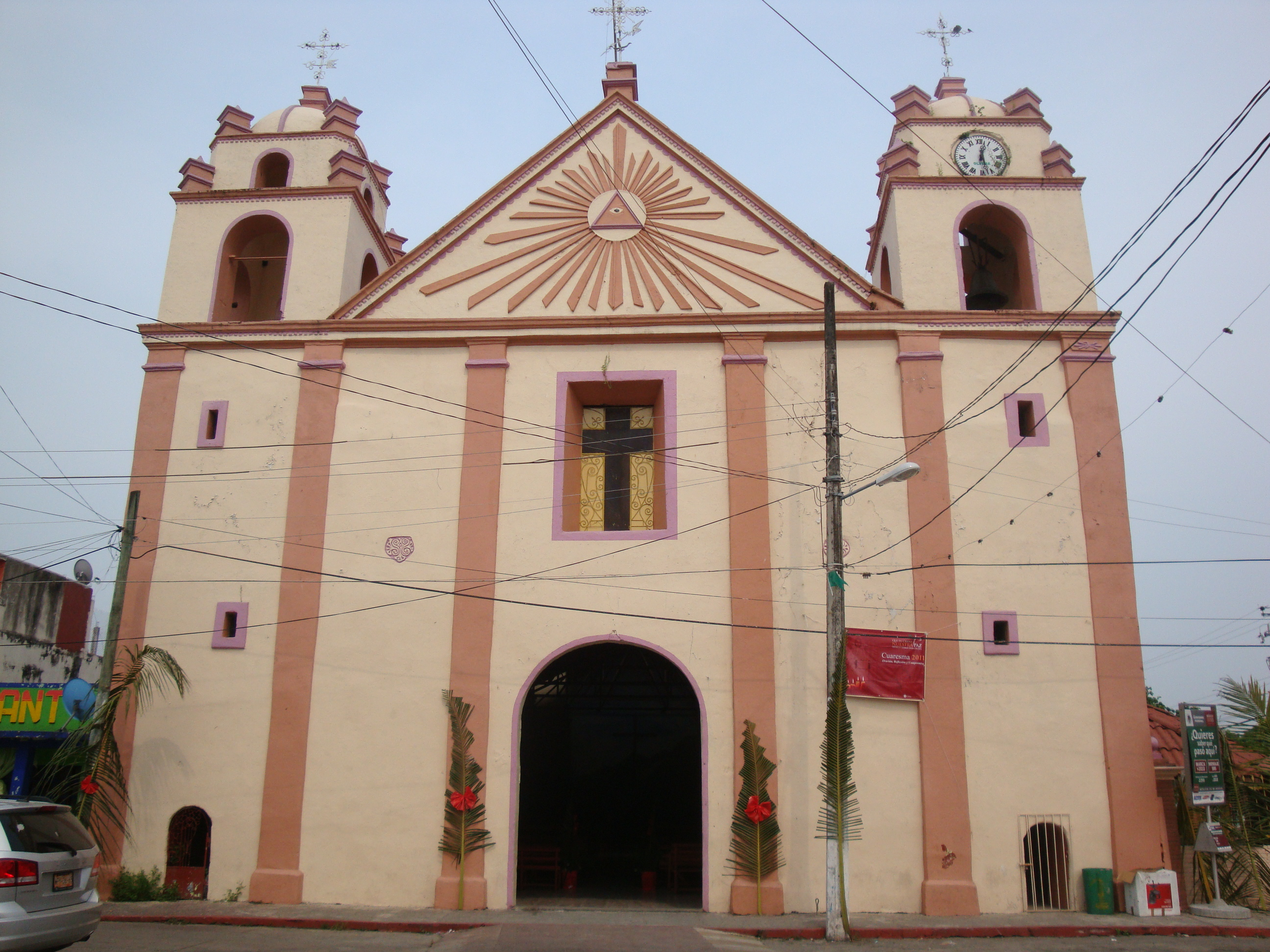 Iglesia de la Virgen de la Asunción en la ciudad de Tacotalpa estado de Tabasco Méxco. En la actualidad esta iglesia es la más antigua de Tabasco ya que su construcción inició en 1703 y culminó en 1710 cuando Tacotalpa era la capital de la provincia colonial de Tabasco. Sobrevivió a las fuertes crecientes del río de La Sierra que destruyeron gran parte de la ciudad colonial y a la campaña antirreligiosa emprendida por el entonces gobernador Tomás Garrido Canabal.